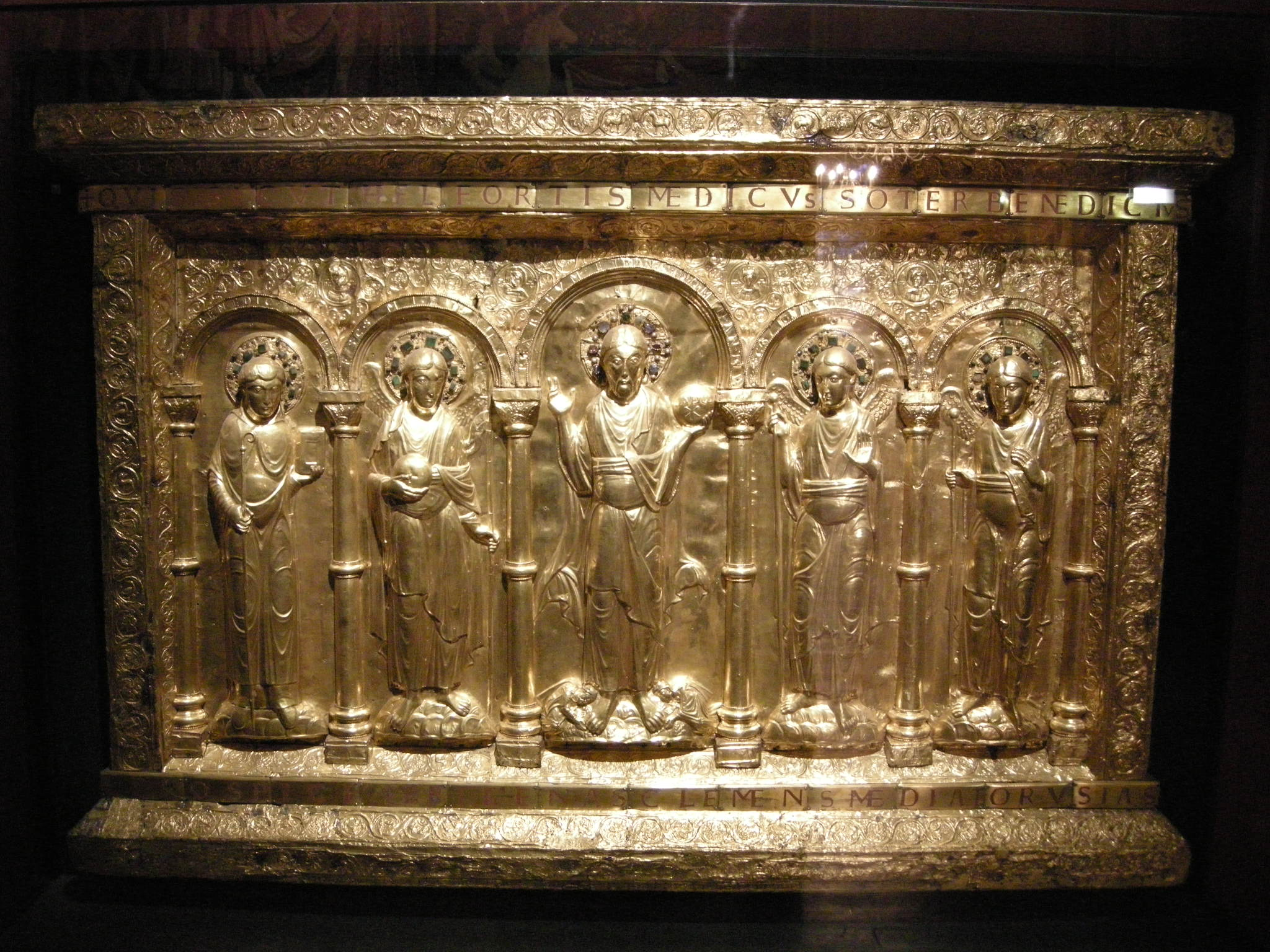 Antependium di basilea